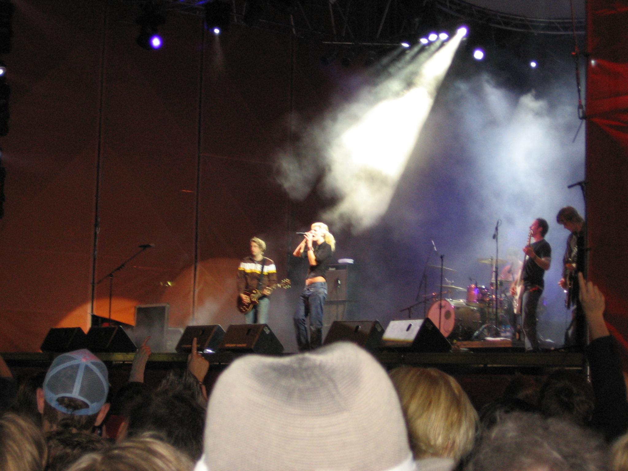 Die Band Juli auf dem Schlossgrabenfest 2006. Die Bilder entstanden am Samstag den 27.5.2006